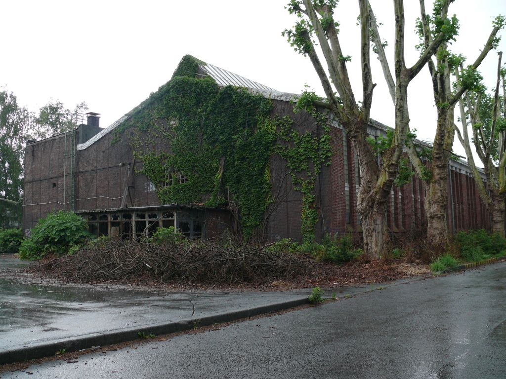 Schalker Verein ??? Almastraße